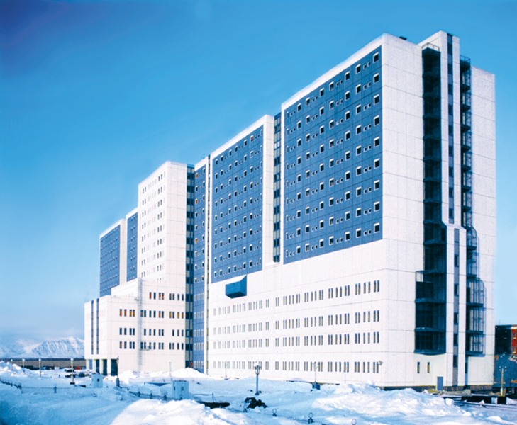 Новое здание Городской больницы №1 г. Норильска